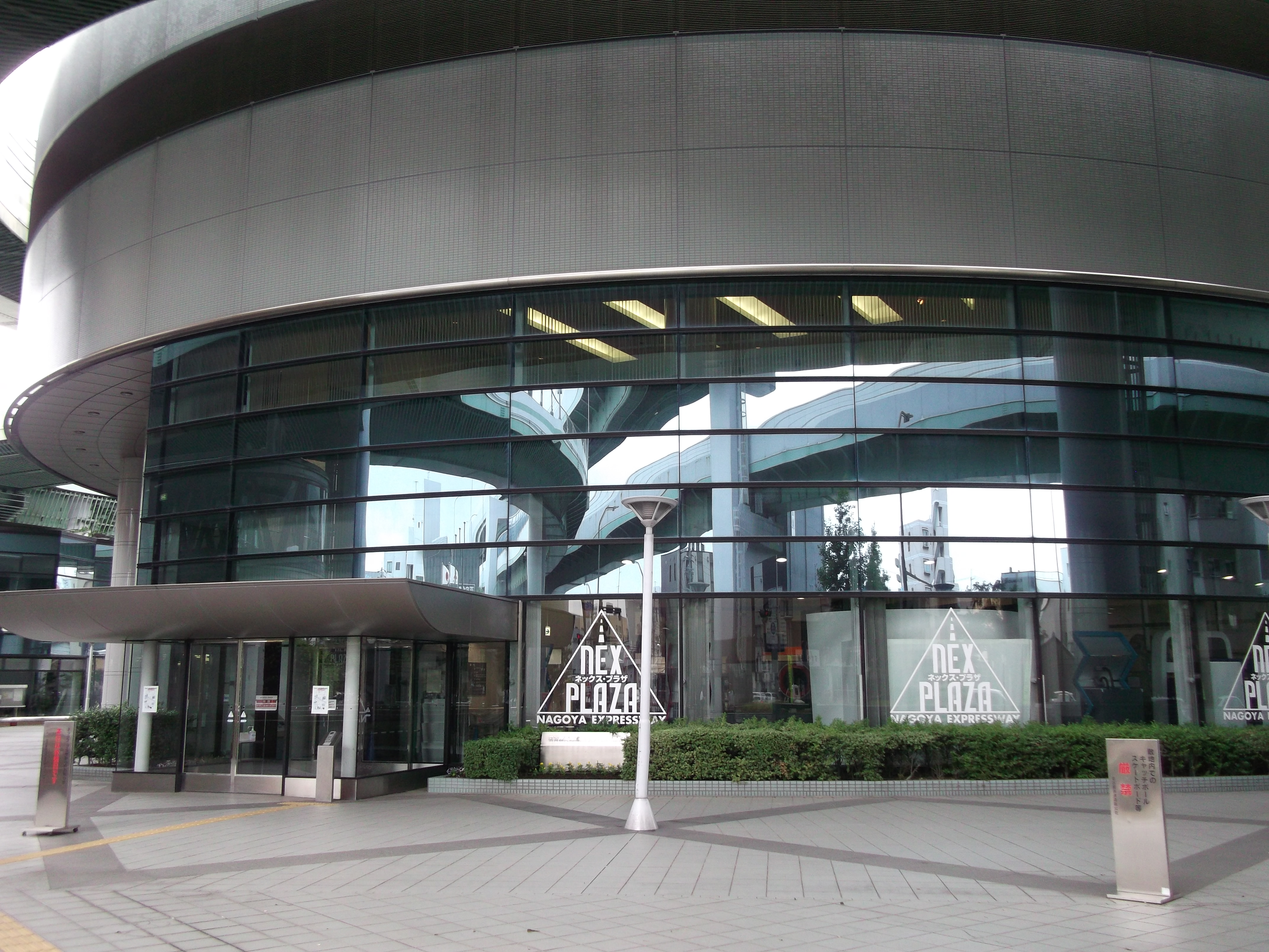 名古屋市北区清水のネックスプラザの外観を東側公道より写す。